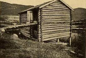 Skottelåven ved Klomstad, Kvam.